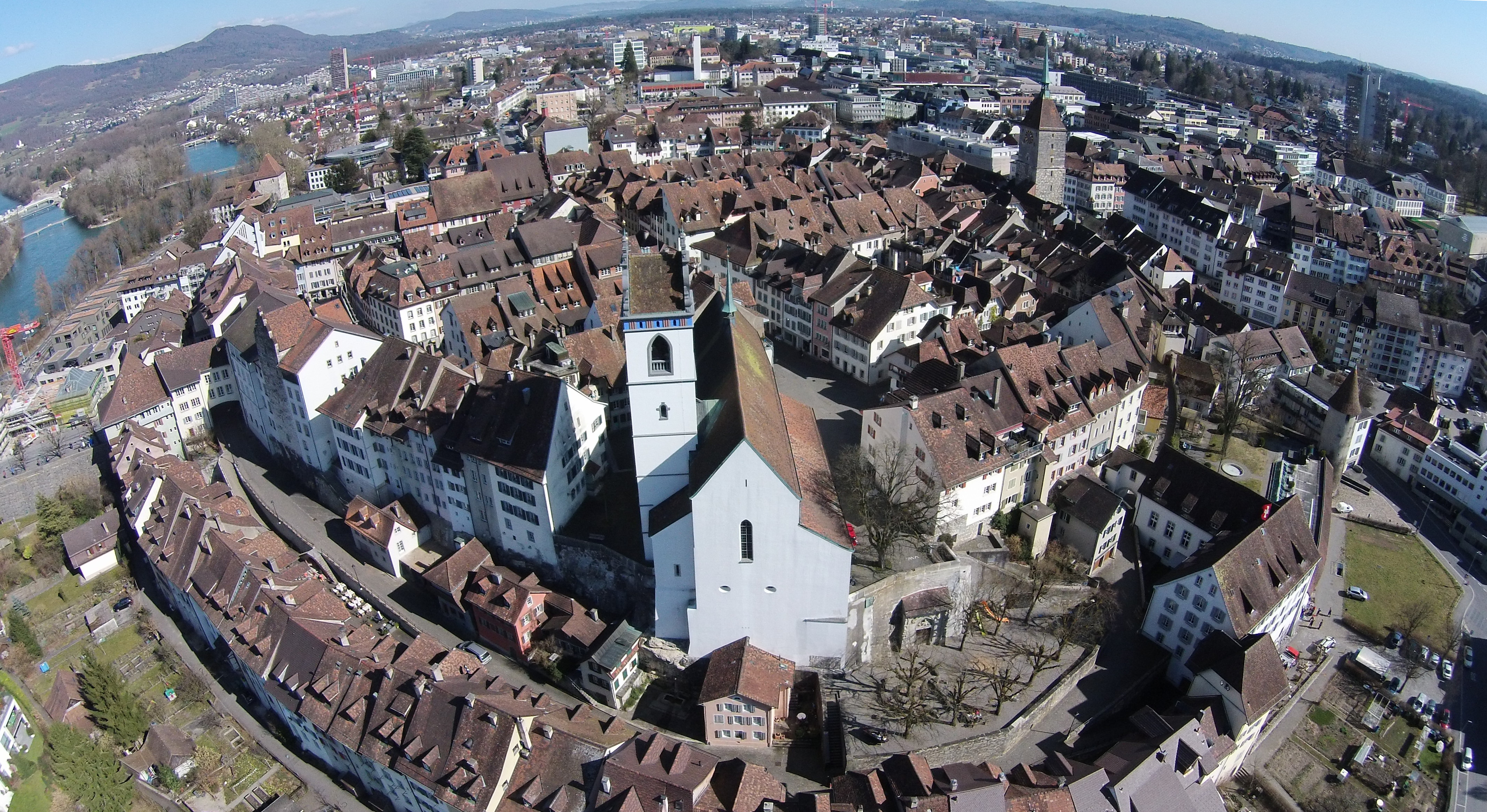 Blick auf die Altstadt von Aarau mit der reformierten Stadtkirche